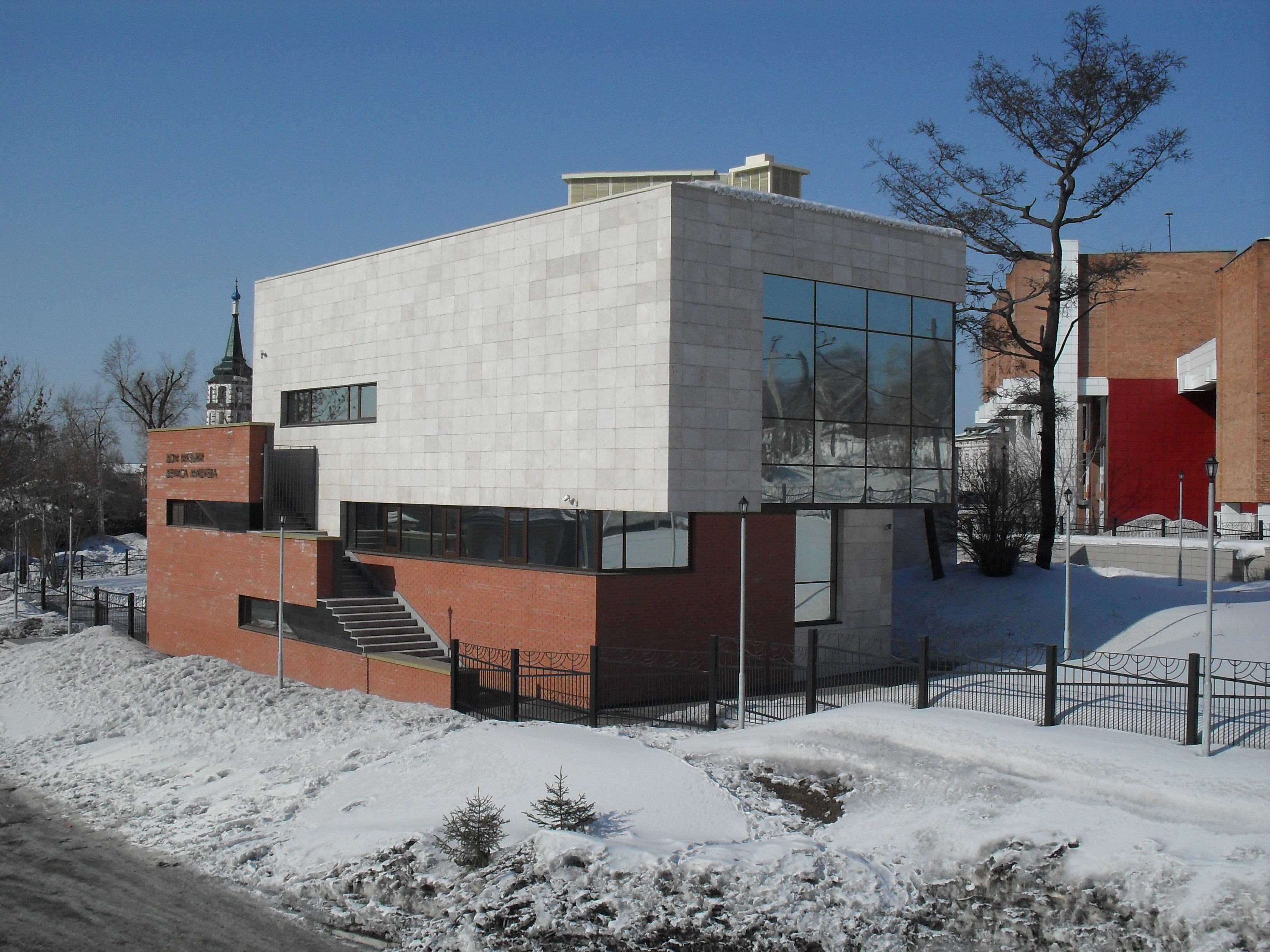 Иркутск. Дом музыки Дениса Мацуева.